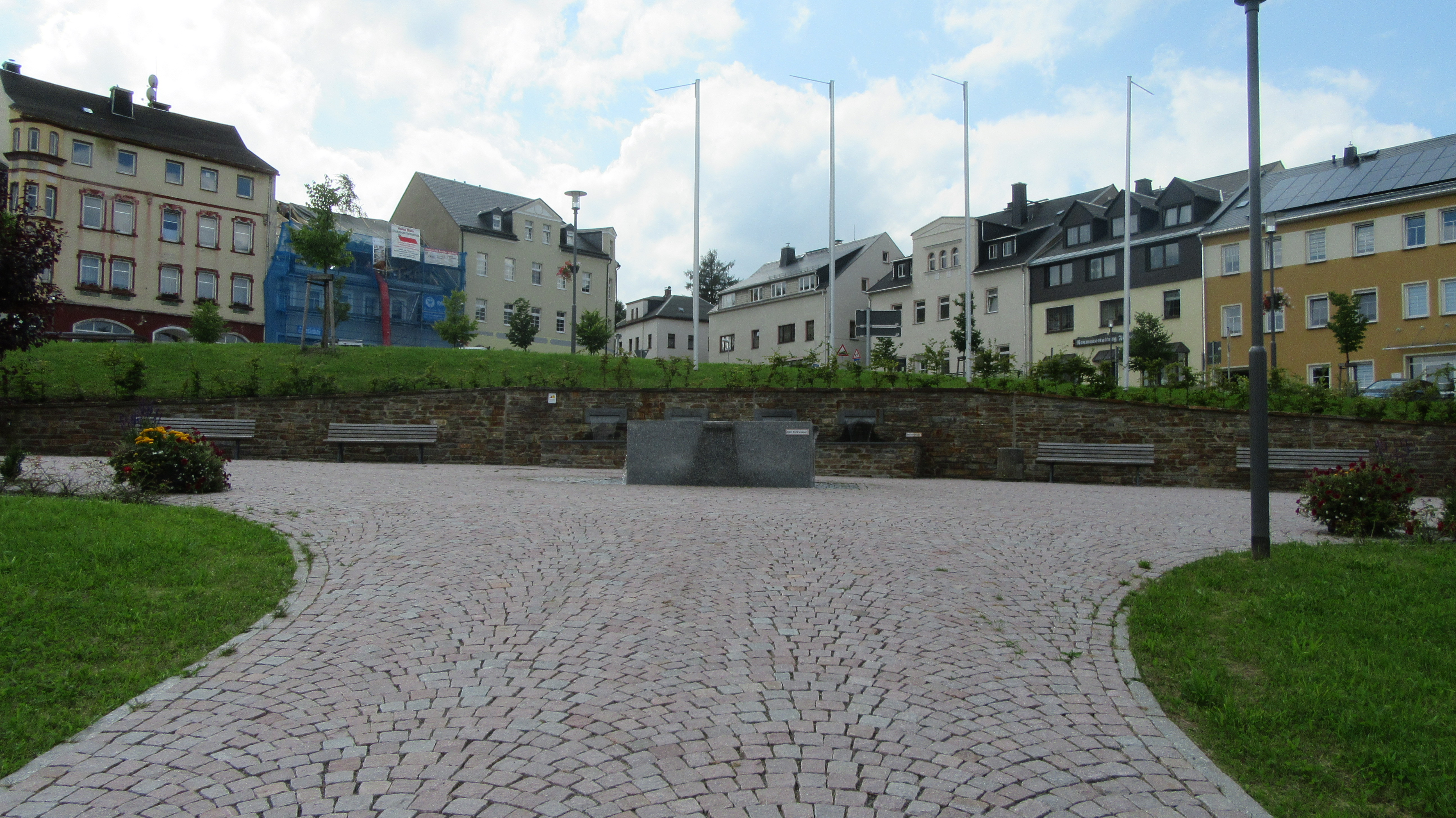 Der Markt(platz) Lengefeld